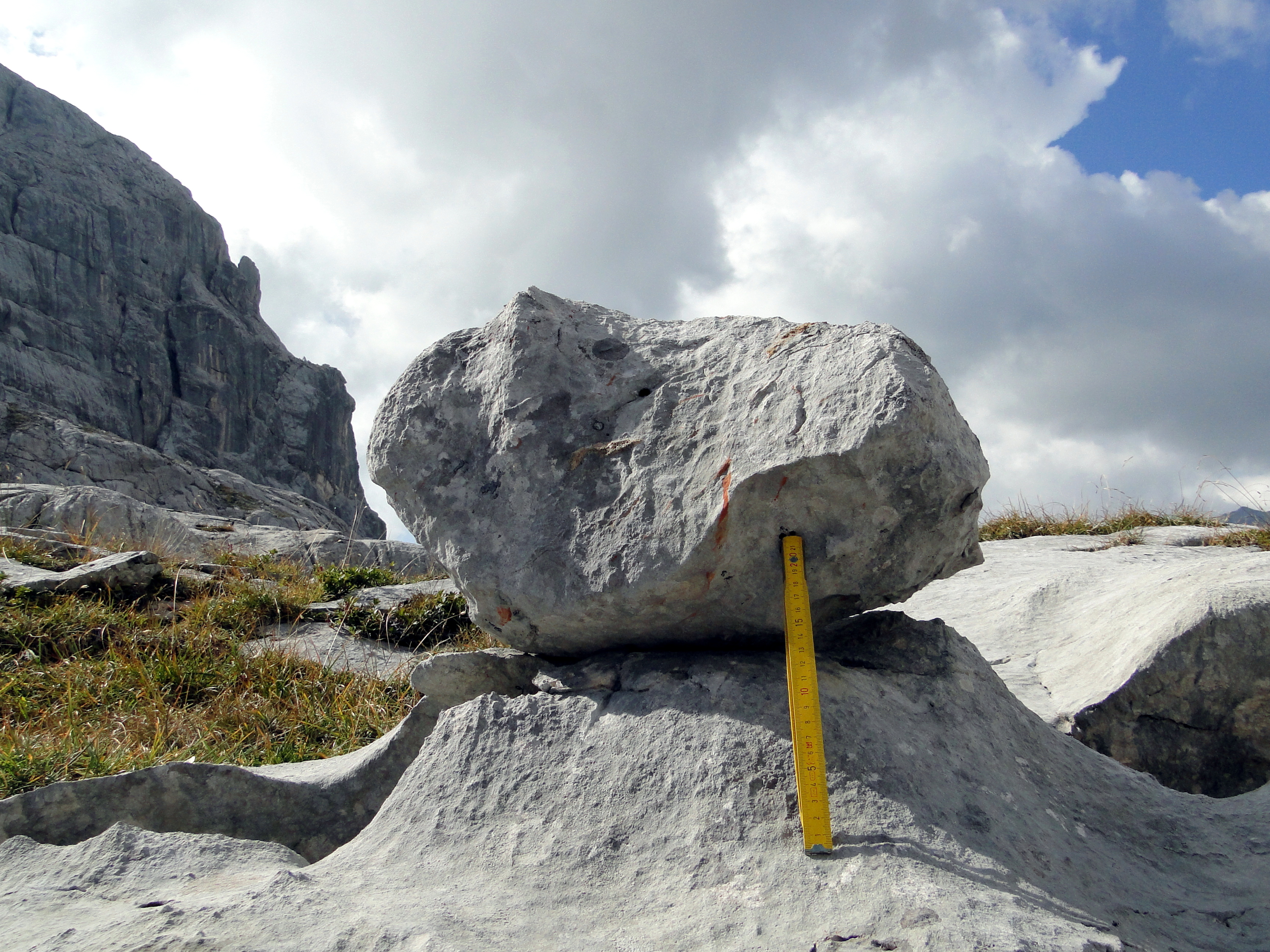 Karsttisch Nahe Schreiberwandegg (Höhe 2019 m; N 473007,4; E 13 34 51,2) auf Daunzeitfläche (12.000 BP); Sockelhöhe über 12 cm